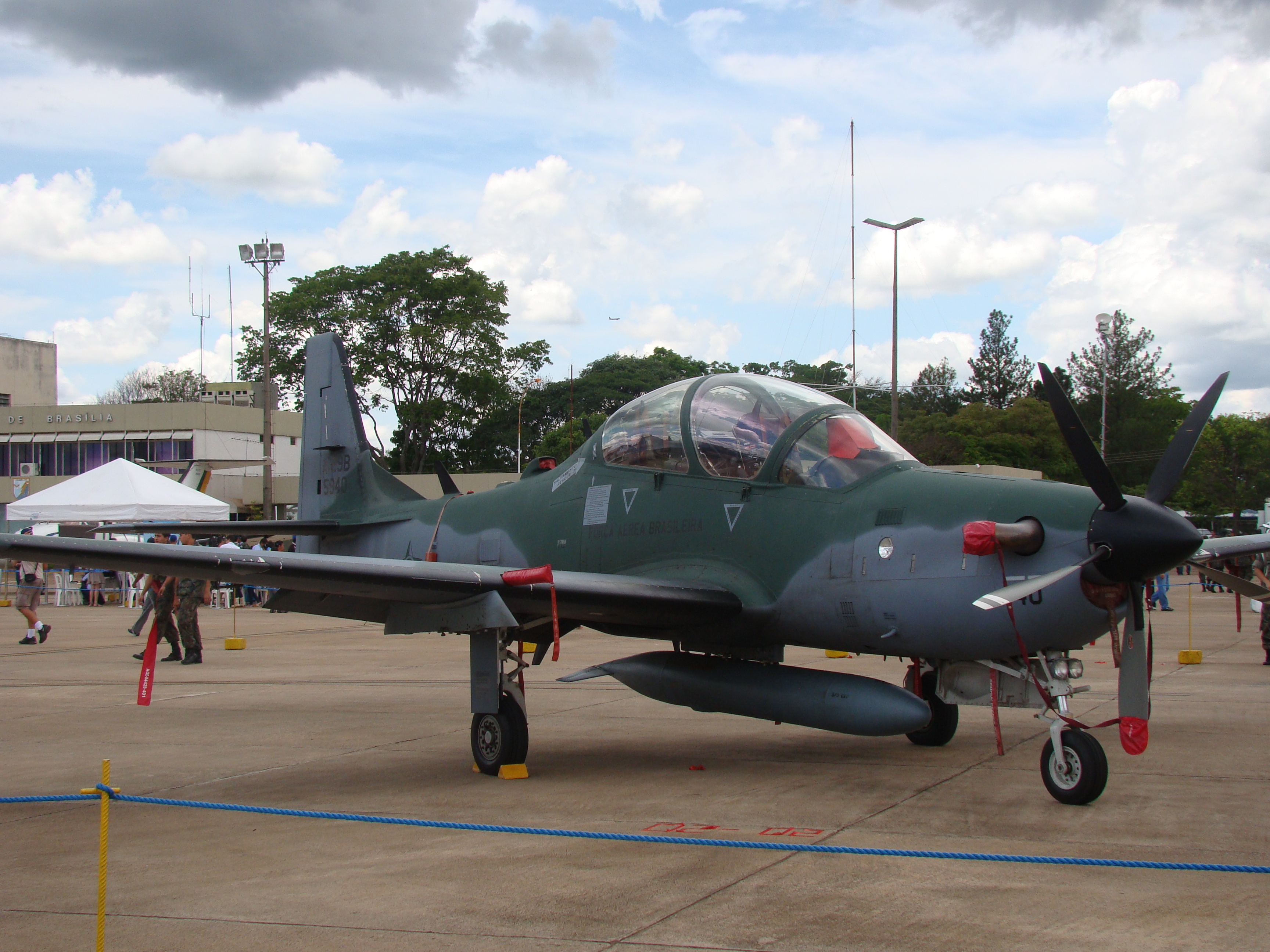 A-29 Força Aérea Brasileira